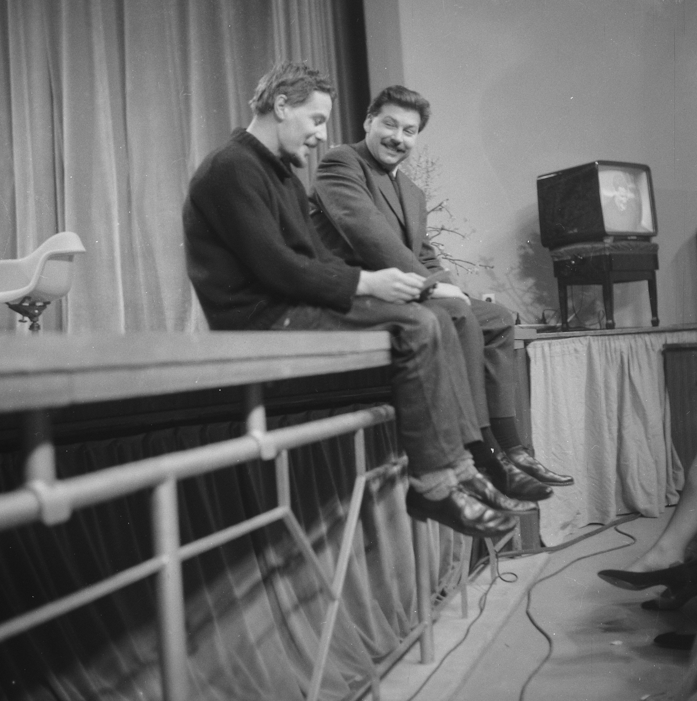 Televisieuitzending "Alles gaat naar wens" (AVRO) met als hoofdpersoon de schilder Karel Appel , Karel Appel (rechts) en zijn vriend de dichter Lucebert die een gedicht voorleest